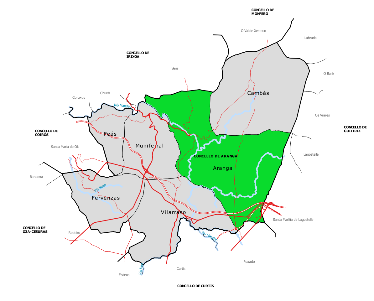 Mapa da parroquia de Aranga no concello de Aranga (Galiza).